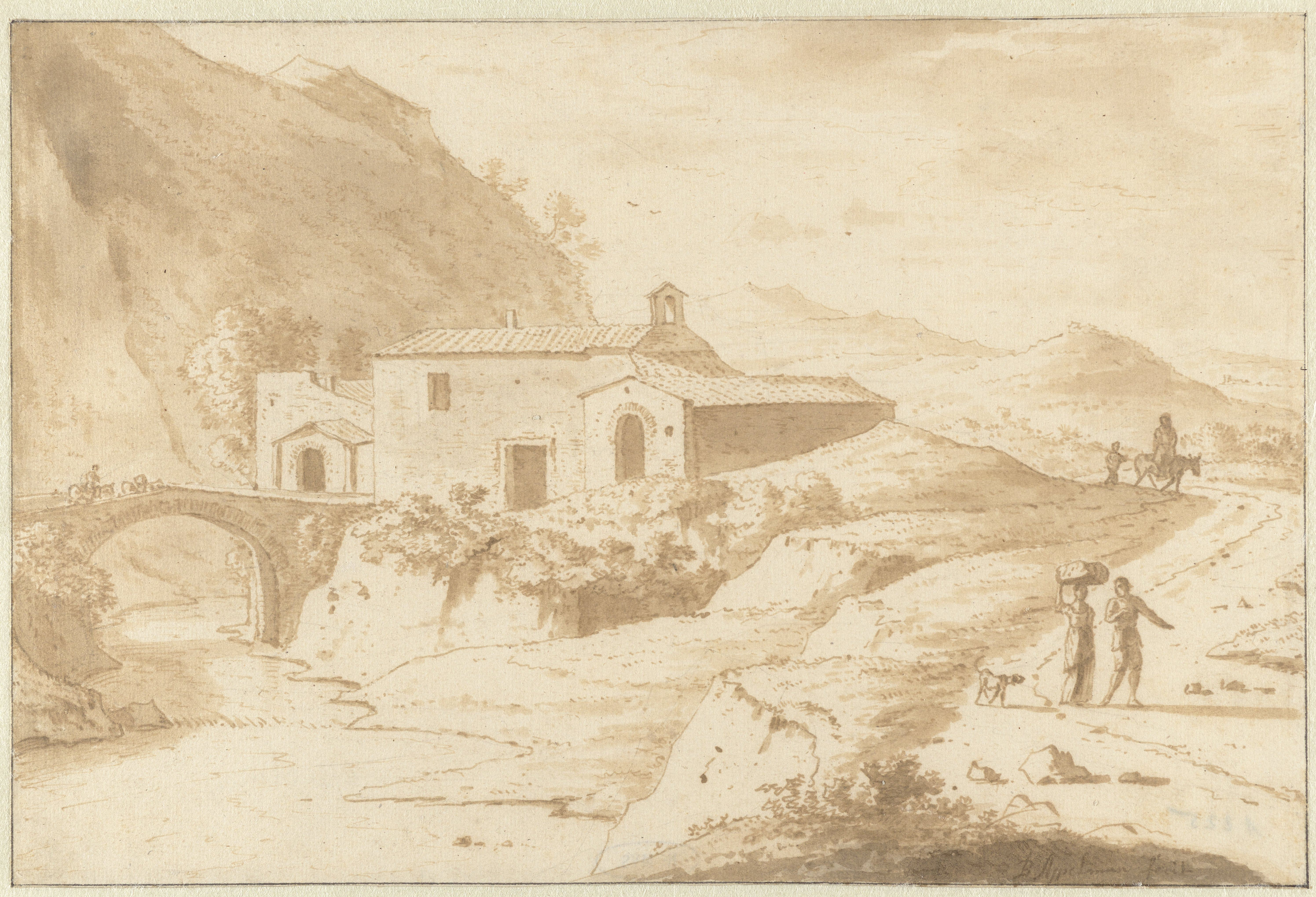 IdentificatieTitel(s): Heuvellandschap met een kapel bij een brugObjecttype: tekening Objectnummer: RP-T-1883-A-225Opschriften / Merken: signatuur, recto rechtsonder: ‘B. Appelman’VervaardigingVervaardiger: tekenaar: Bartholomeus Appelman (vermeld op object)Datering: 1650 - 1686Fysieke kenmerken: penseel in bruin over schets van zwart krijt of grafietMateriaal: papier grafiet krijt Techniek: penseelAfmetingen: h 159 mm × b 237 mmVerwerving en rechtenVerwerving: aankoop mei-1883Copyright: Publiek domein